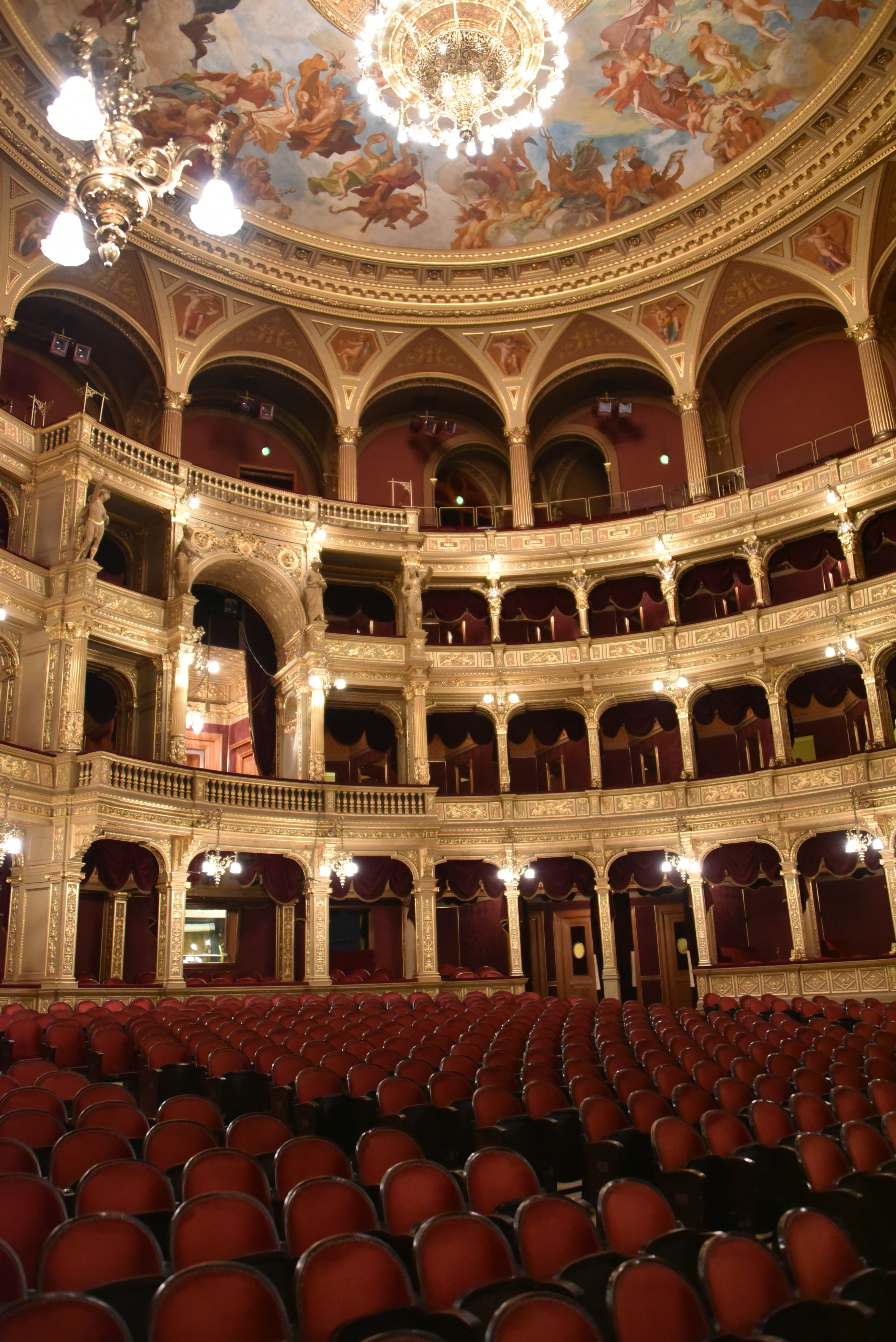 Ungarische Staatsoper - Innenraum